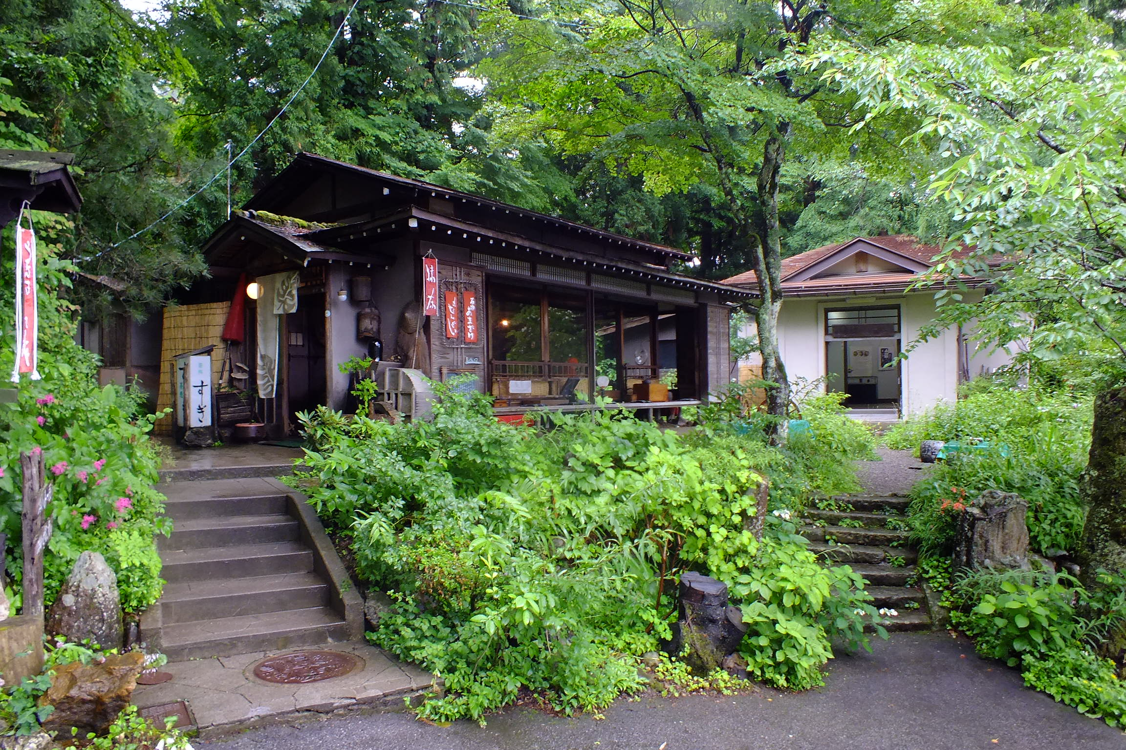 Dr. Fukurai Memorial museum(福来博士記念館) 所在地： 〒506-0506 岐阜県高山市堀端町８ 電話： 0577-32-2052